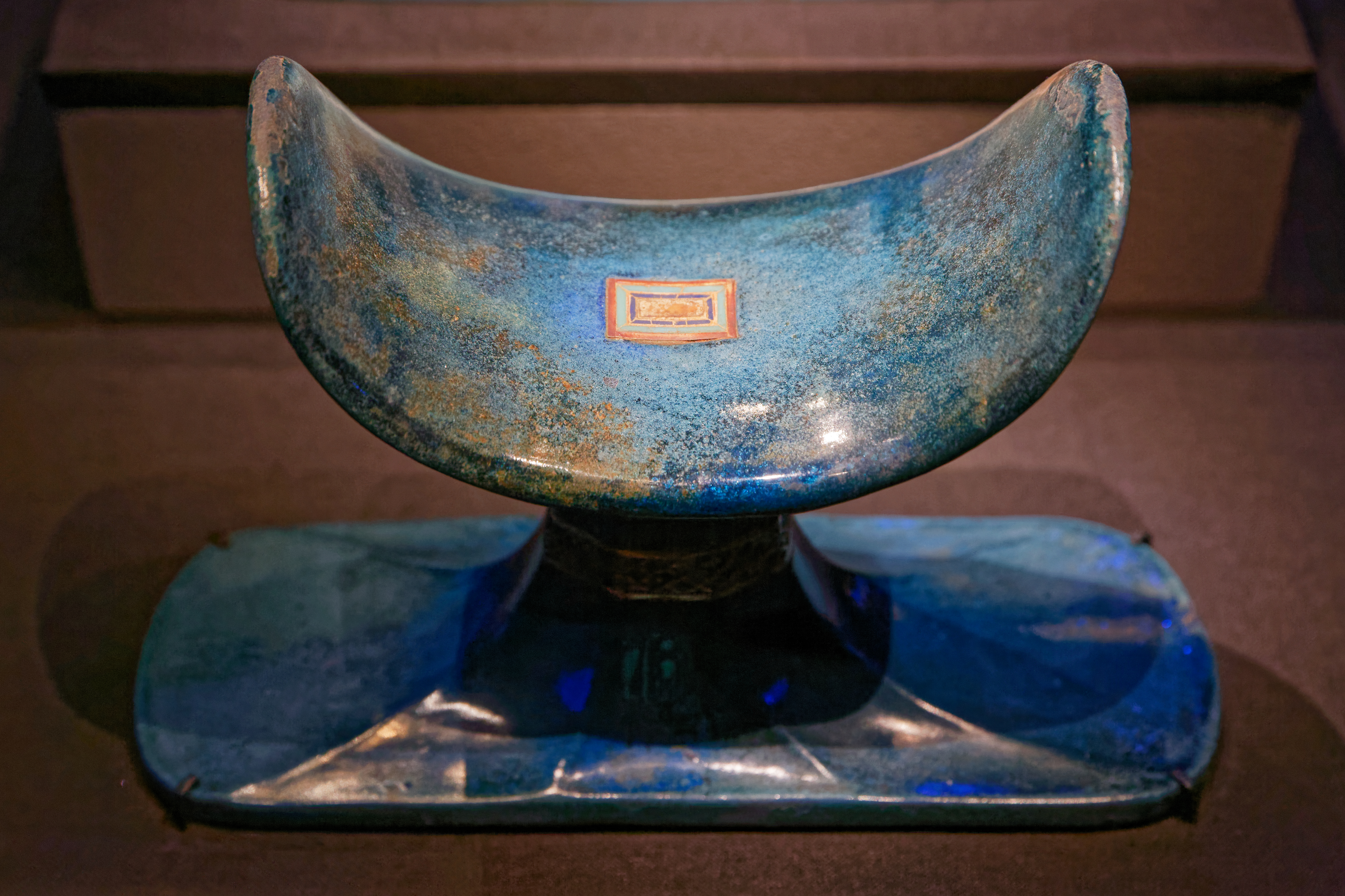 Appui-tête en faïence eguptienne bleu foncé avec inscriptions.